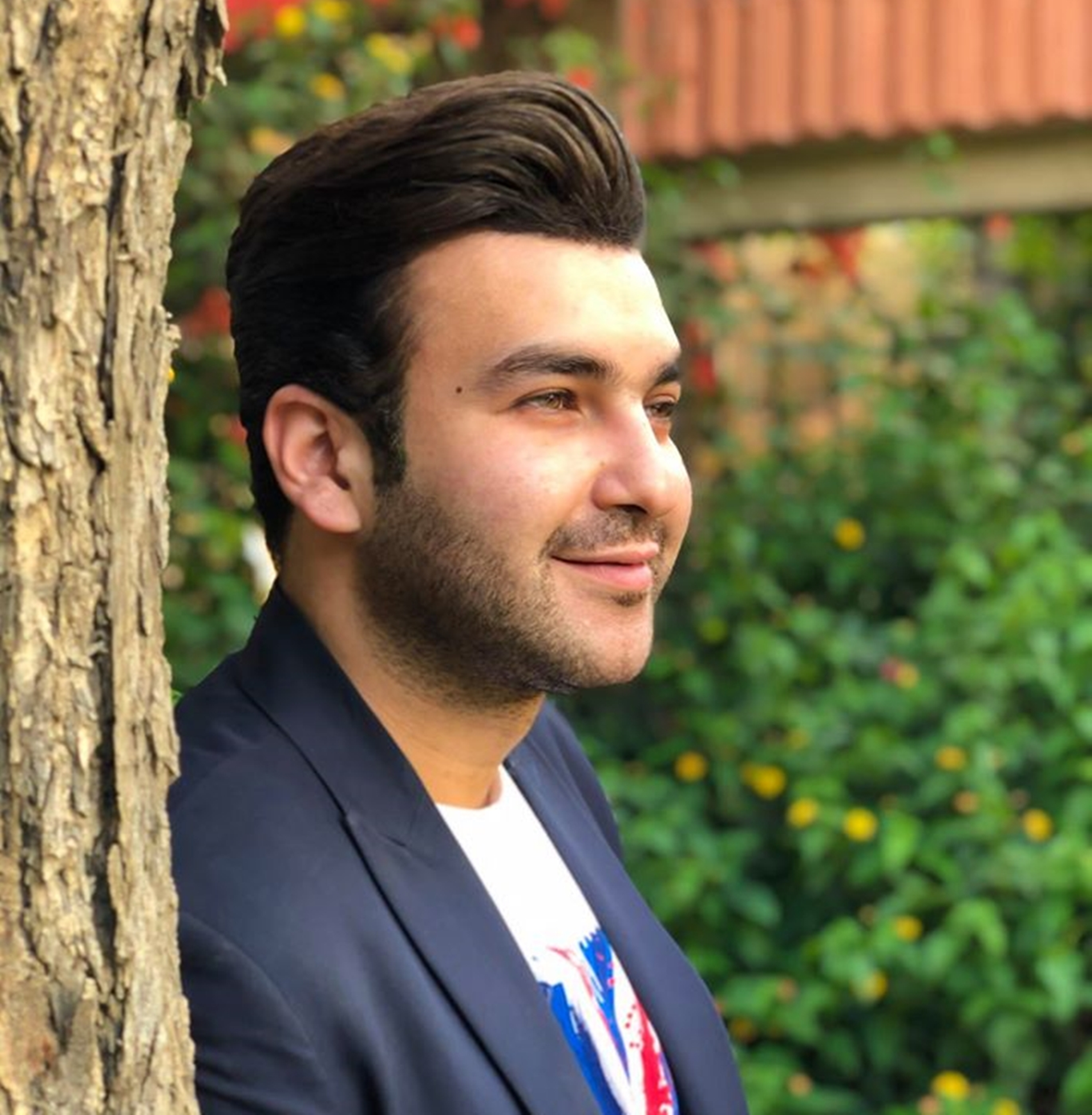 كريم أسامة